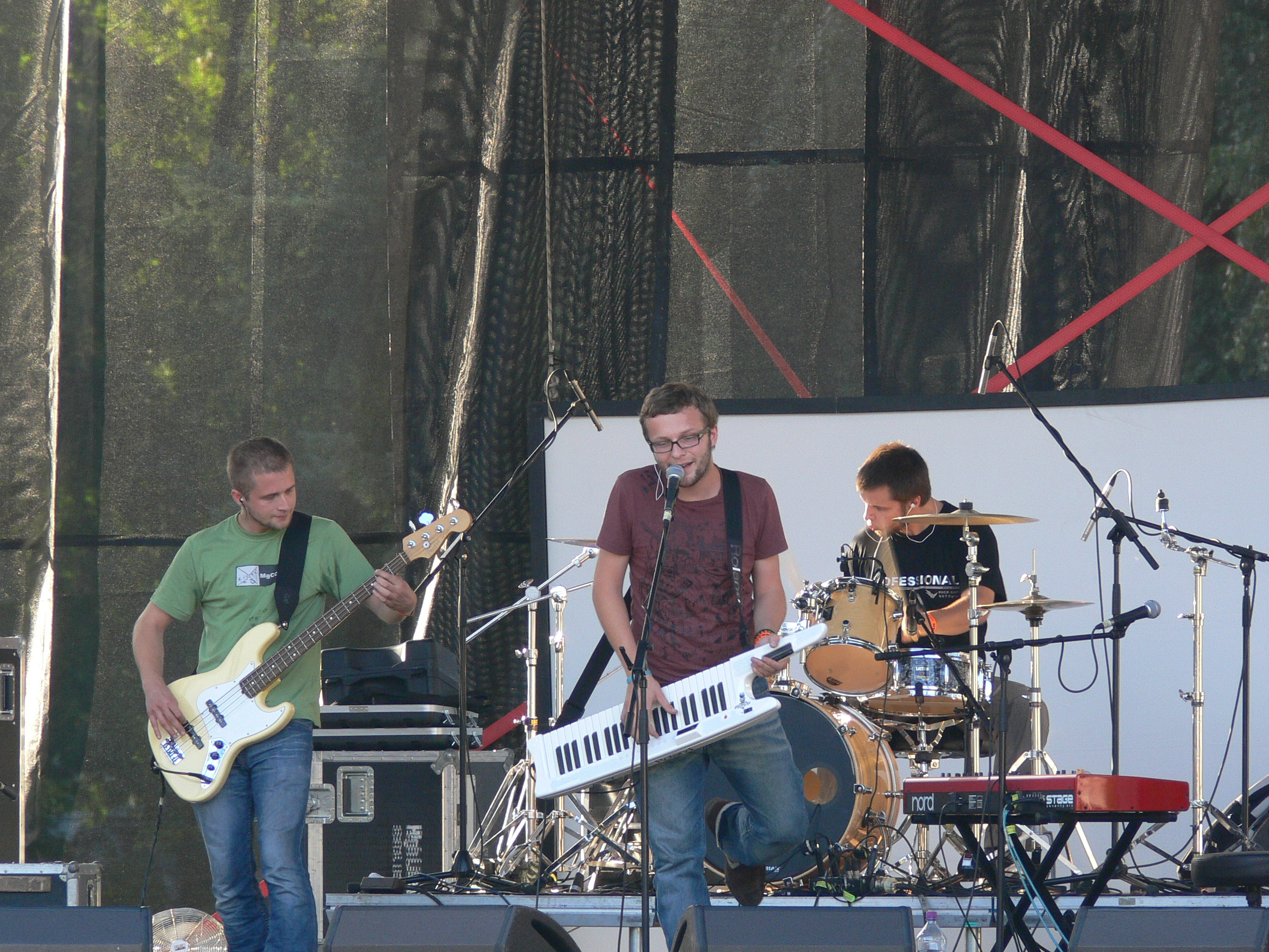 Komajota (Martin Husovsky, Michal Kral a Stano Corej)